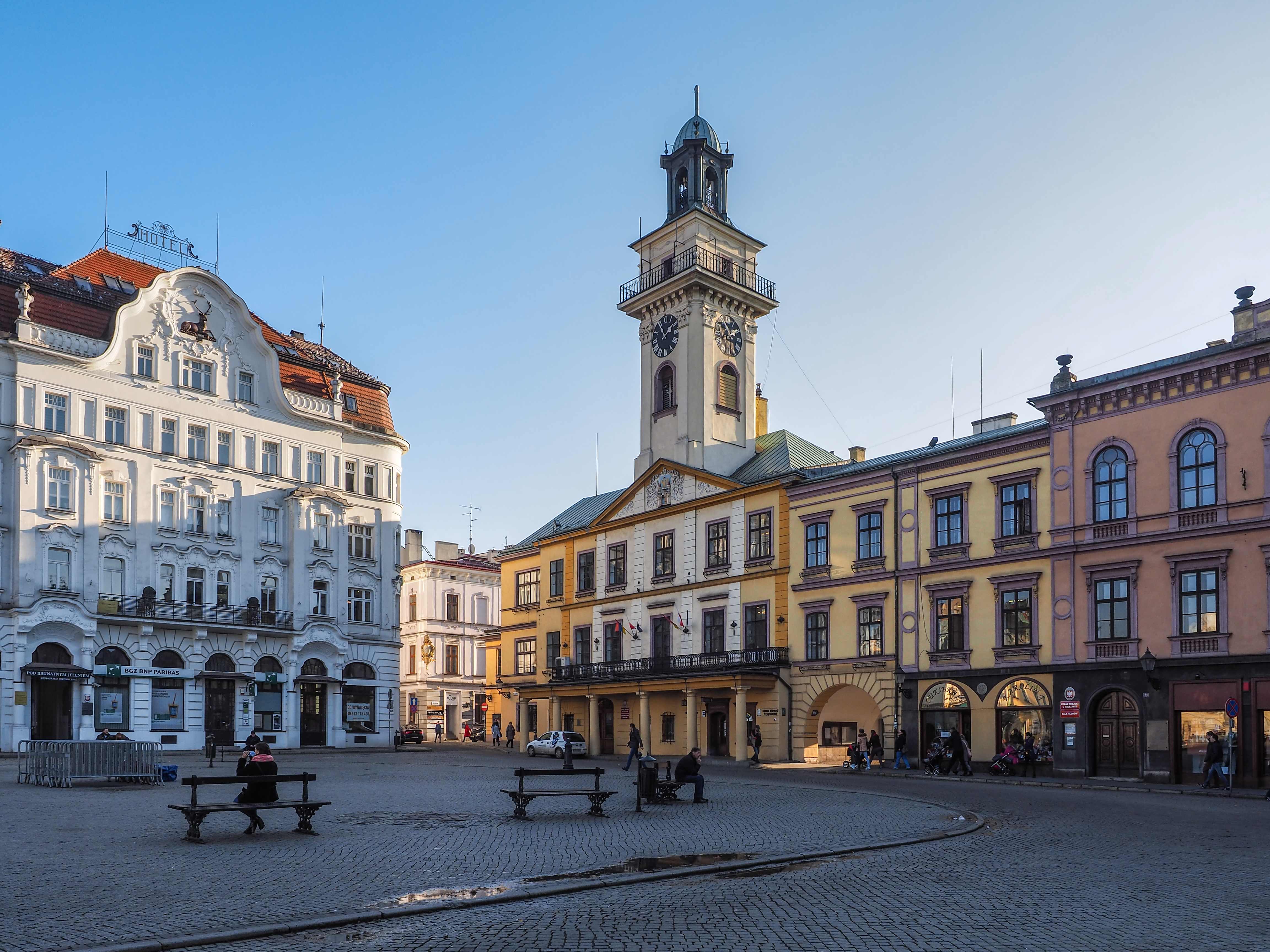 Cieszyn, Ratusz w Cieszynie Wikidata has entry Q9304369 with data related to this item.